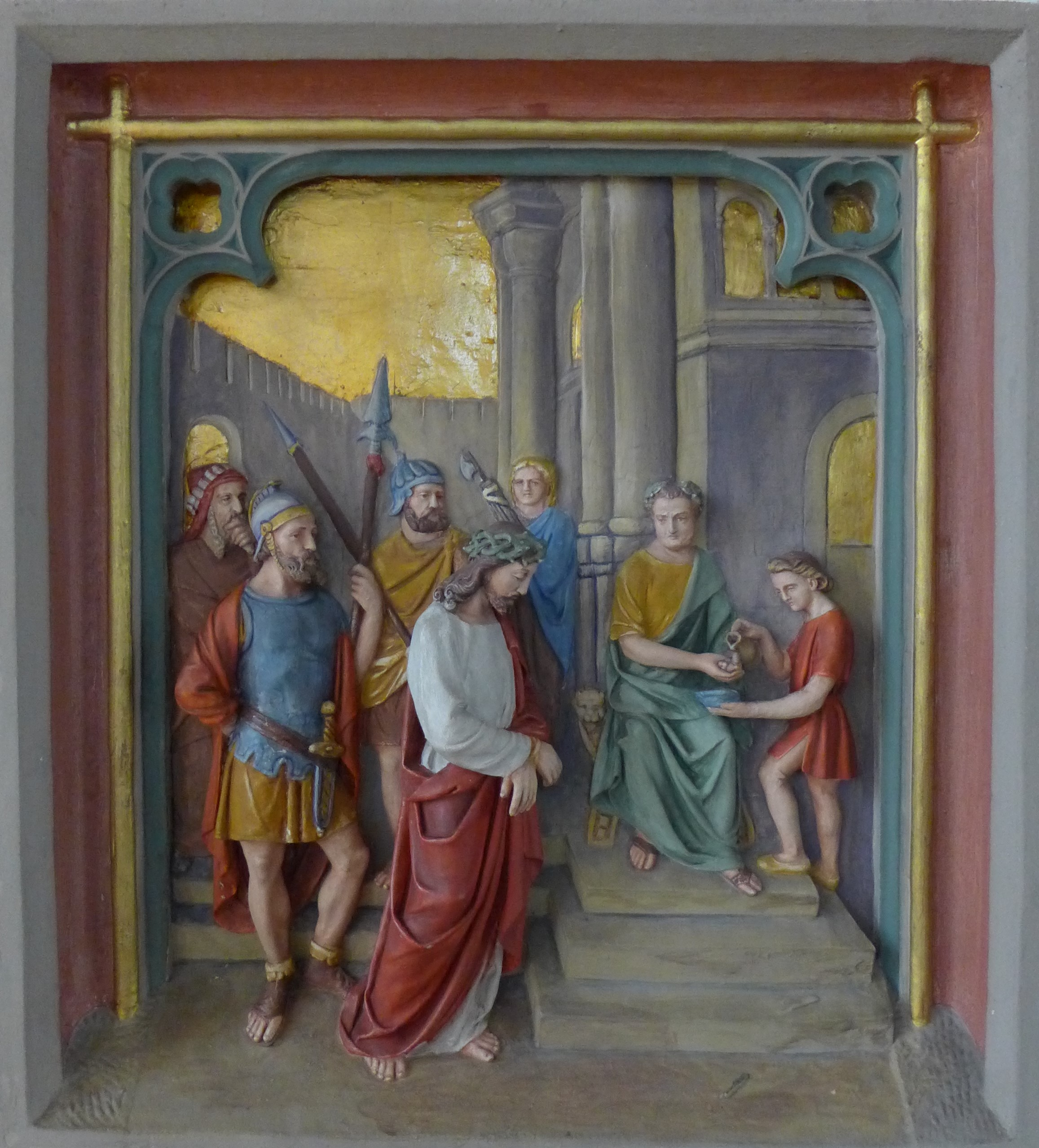 St. Katharina (Wallerfangen), Kreuzwegstation aus Terrakotta